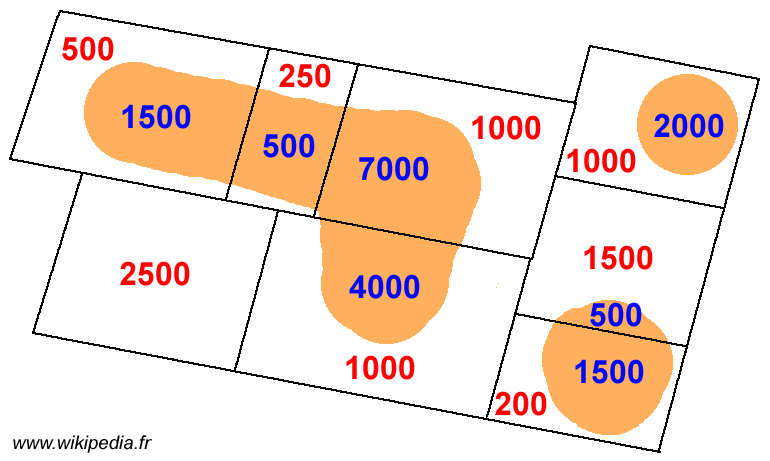 Schéma illustrant l'article sur la notion d'unité urbaine(3 sur 6)